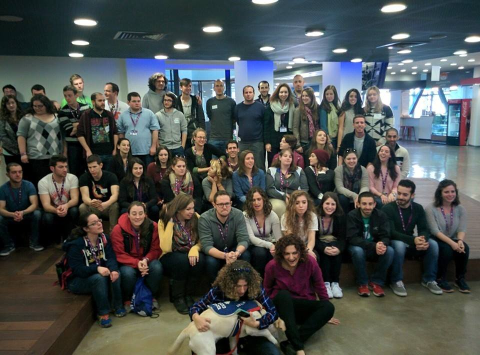 משלחת 'תגלית' במפגש עם סטודנטים מהטכניון